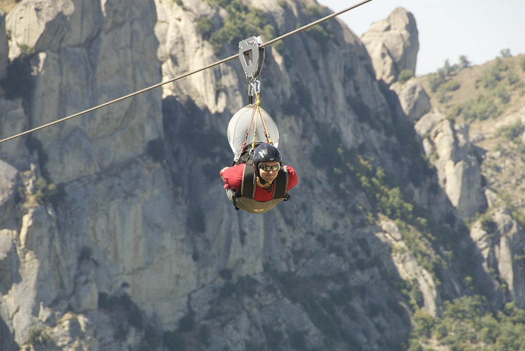 Volo dell'angelo, manifestazione tra Castelmezzano e Pietrapertosa (Basilicata)